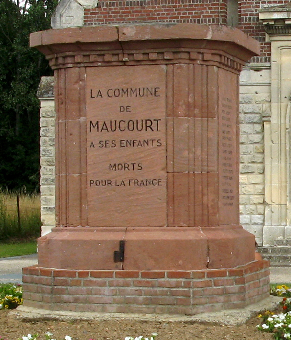 Maucourt, Somme, monument aux morts.